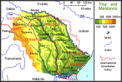 Ancienne principauté de Moldavie (physique)